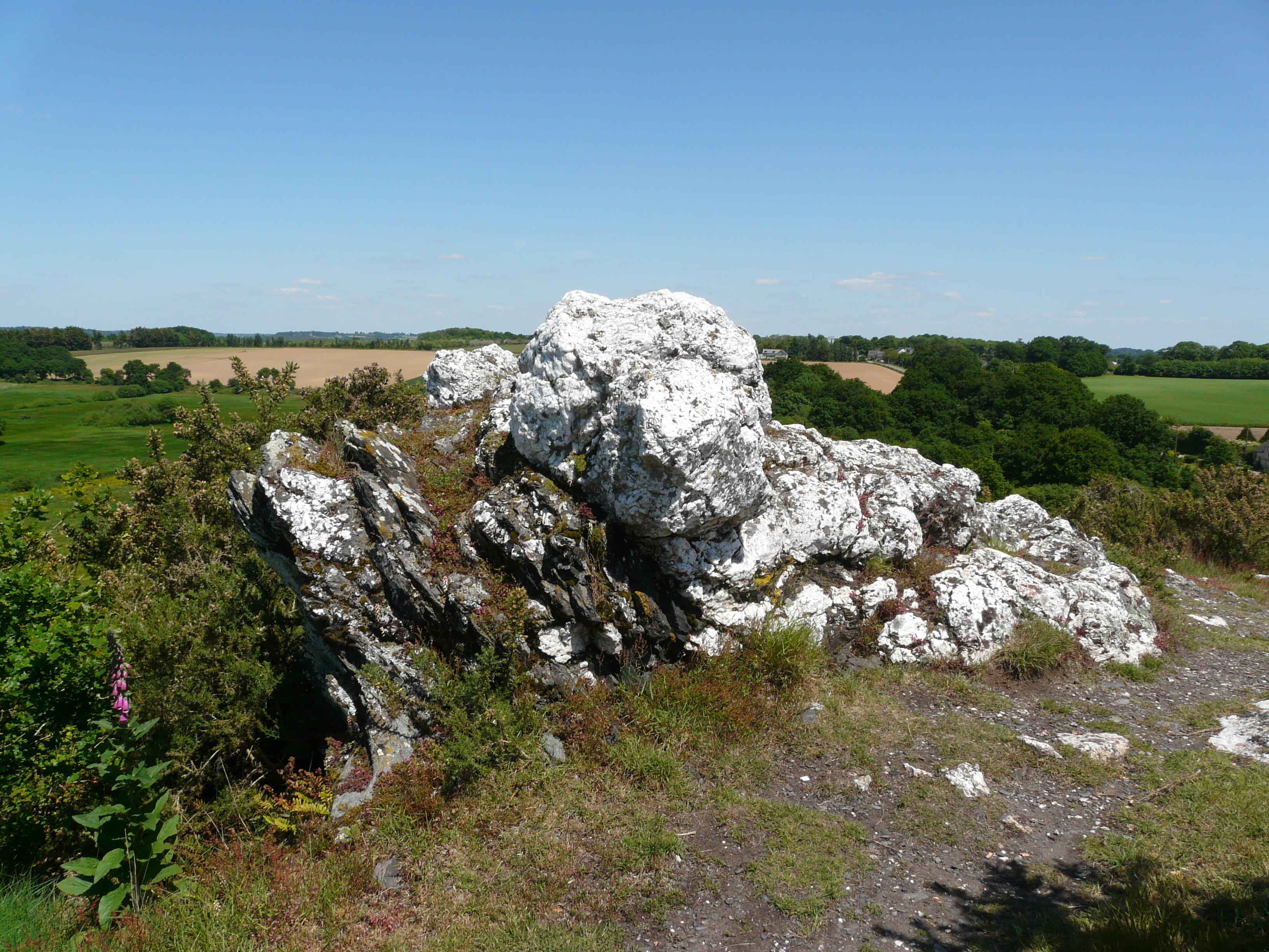 Vue du rocher du veau à l'aplomb de la vallée du Don